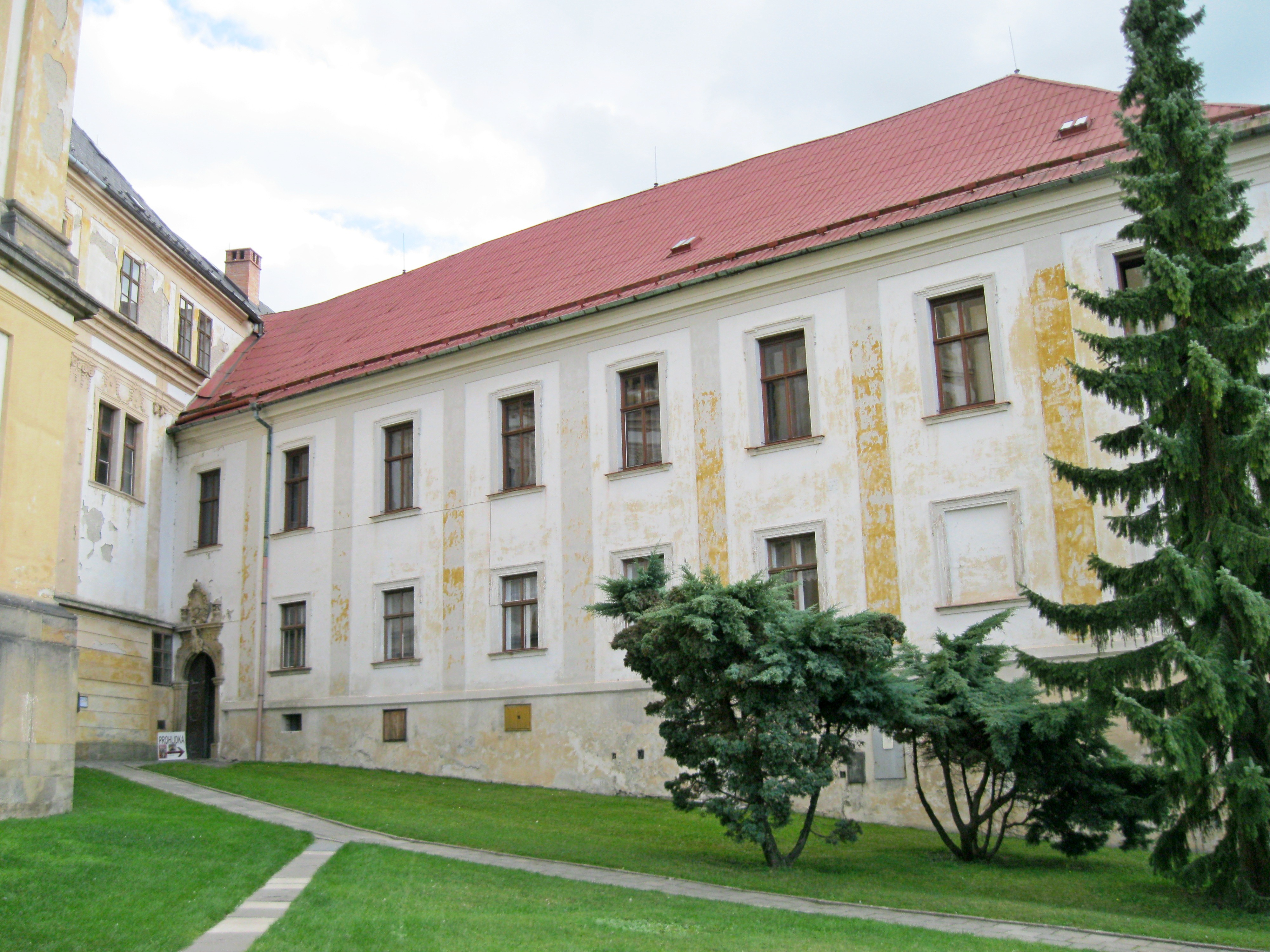 Klášter augustiniánů (Šternberk), Farní 53/7, Šternberk